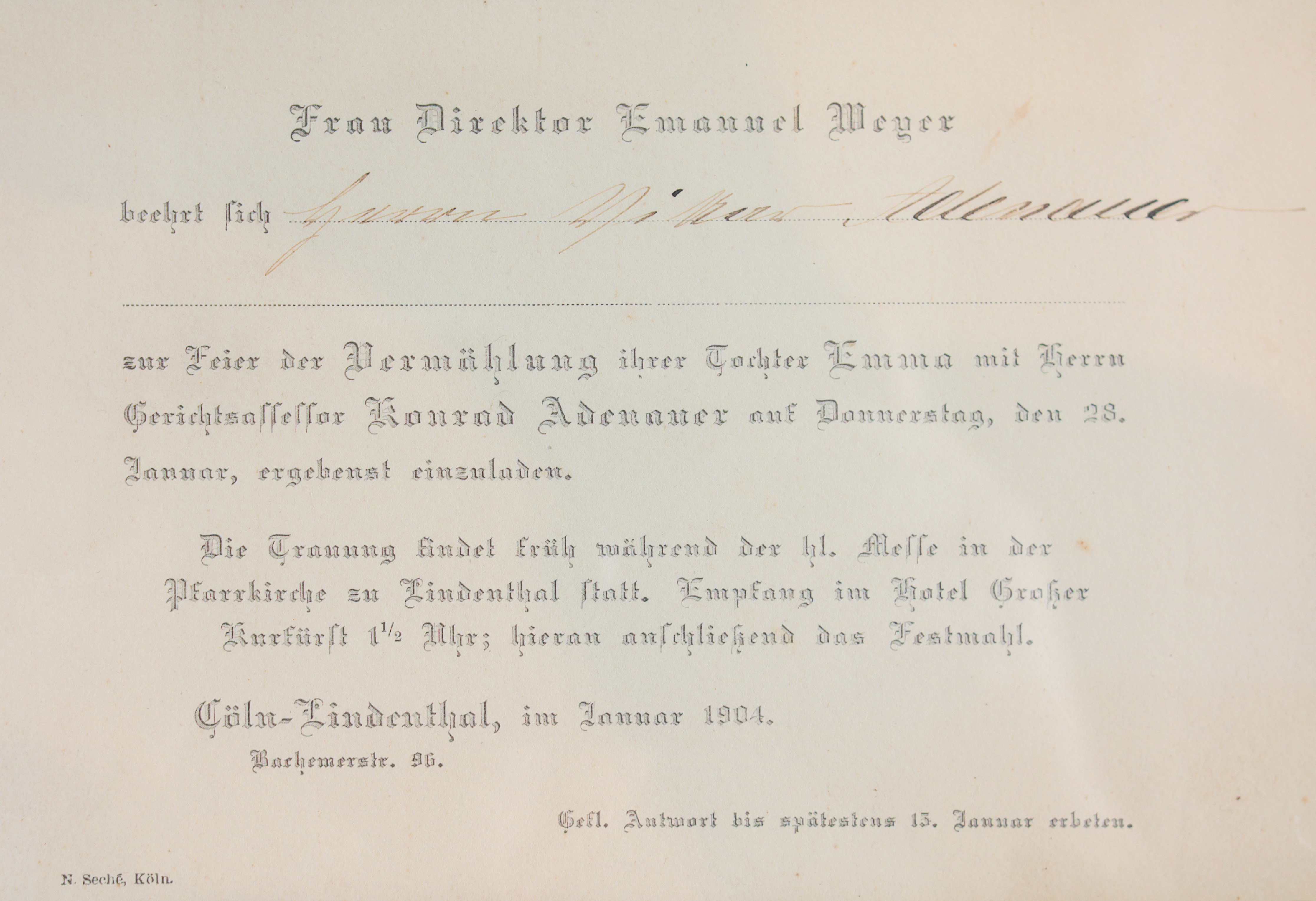 Einladungskarte zur Vermählung von Emma Weyer und Konrad Adenauer 1904